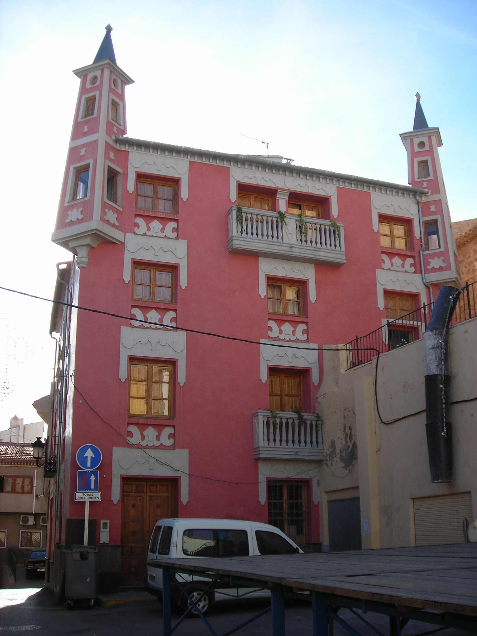 Casa del cura, en Ulea (Murcia).